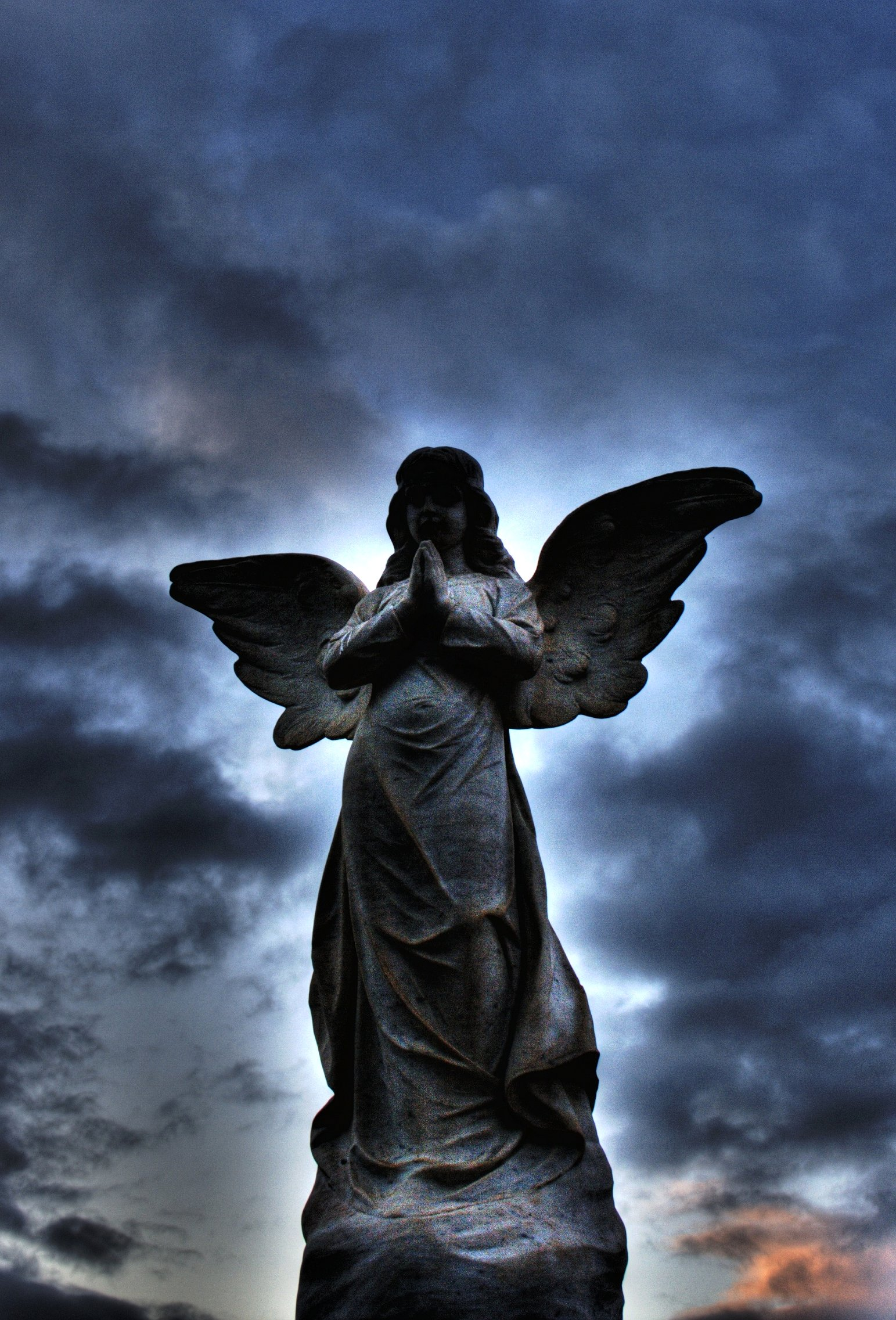 Single Image HDR of Angel Head stone at Heidelberg Cemetery